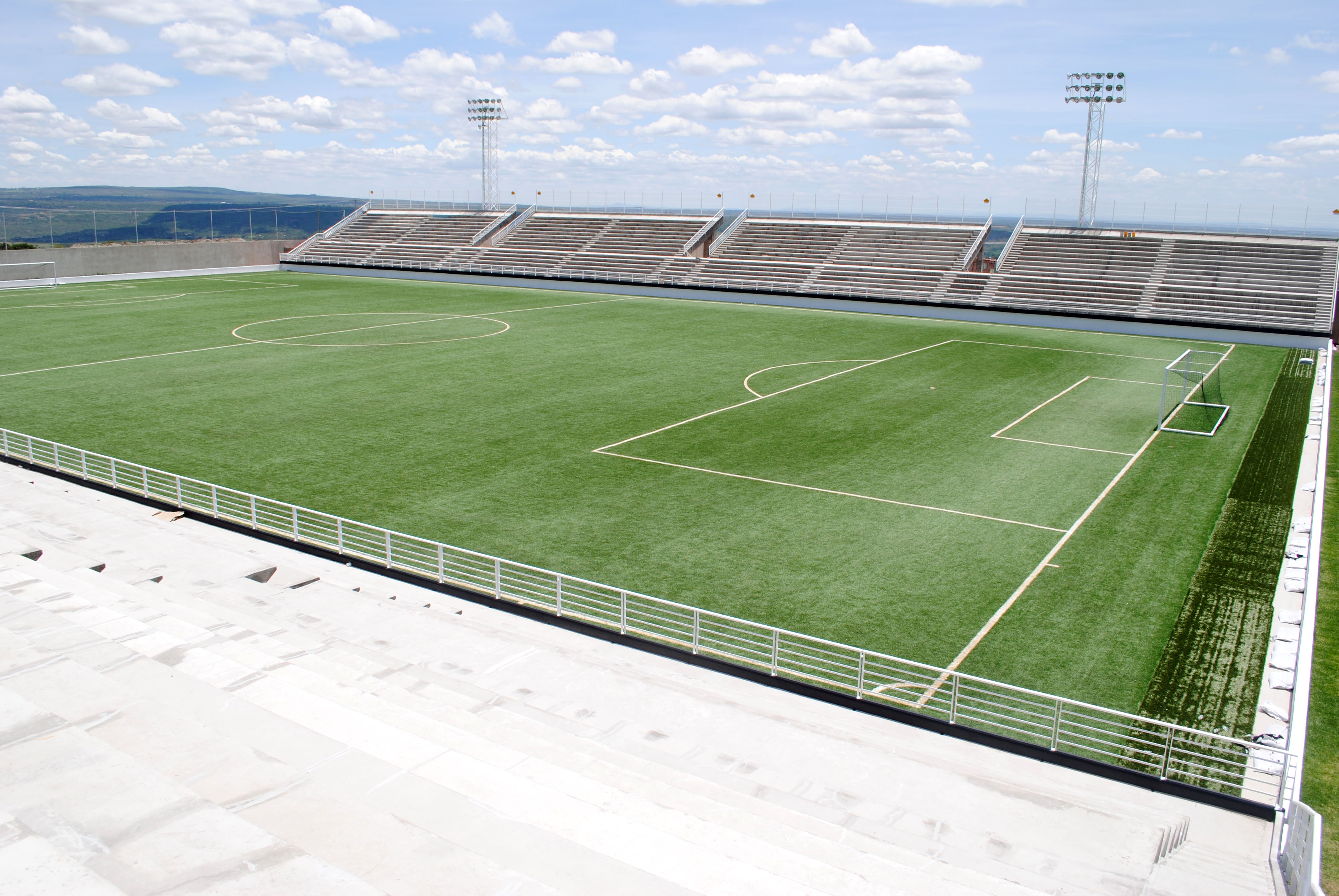 Photo taken of the facilities: Las Animas football stadium,Club deportivo yahualica de los altosUnknown foto tomada de las instalaciones del: estadio de futbol las animas, del club deportivo yahualica de los altos.